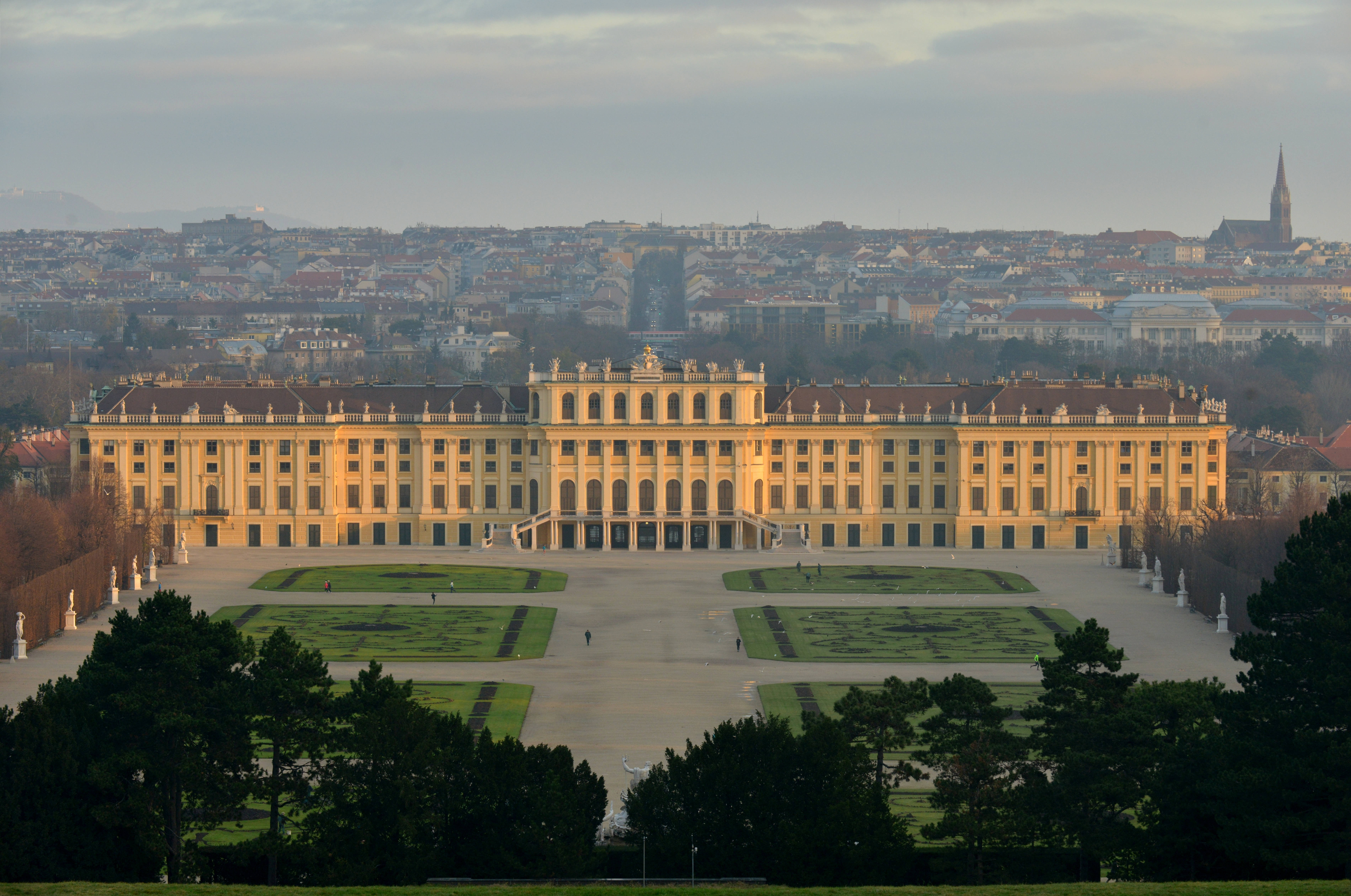 Sicht von der Gloriette (Wien). Das Schloss Schönbrunn ist das größte Schloss und eines der bedeutendsten und meistbesuchten Kulturgüter Österreichs. Das Schloss und der etwa 160 ha große Park sind seit 1996 Teil des UNESCO-Weltkulturerbes. Eine Hauptattraktion im Schlosspark ist der älteste noch bestehende Zoo der Welt, der Tiergarten Schönbrunn (16 ha).